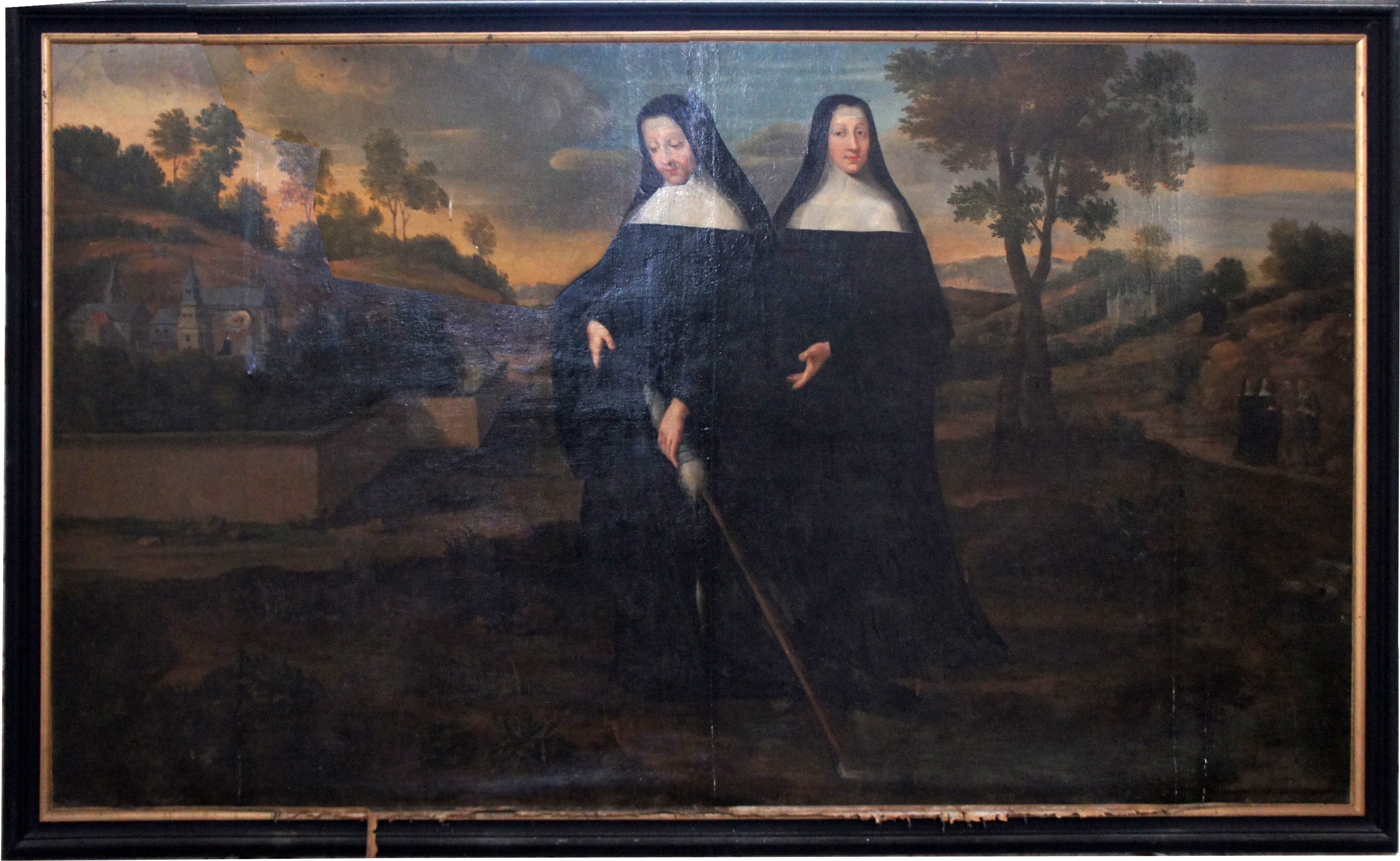 Vue de Berthe d'Avenay. Attribué à Jean Hélart .